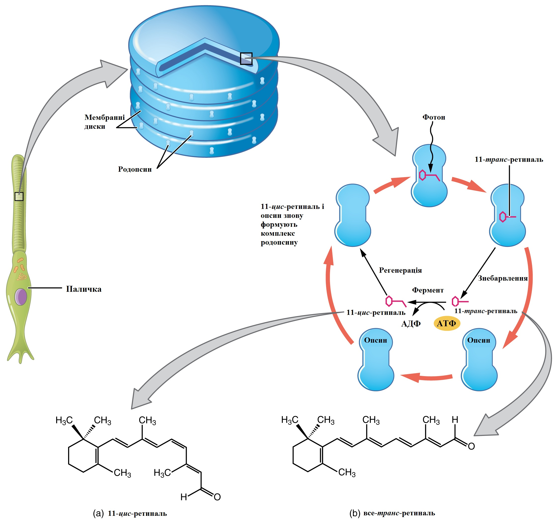 Процес фототрансдукції у фоторецепторі палички